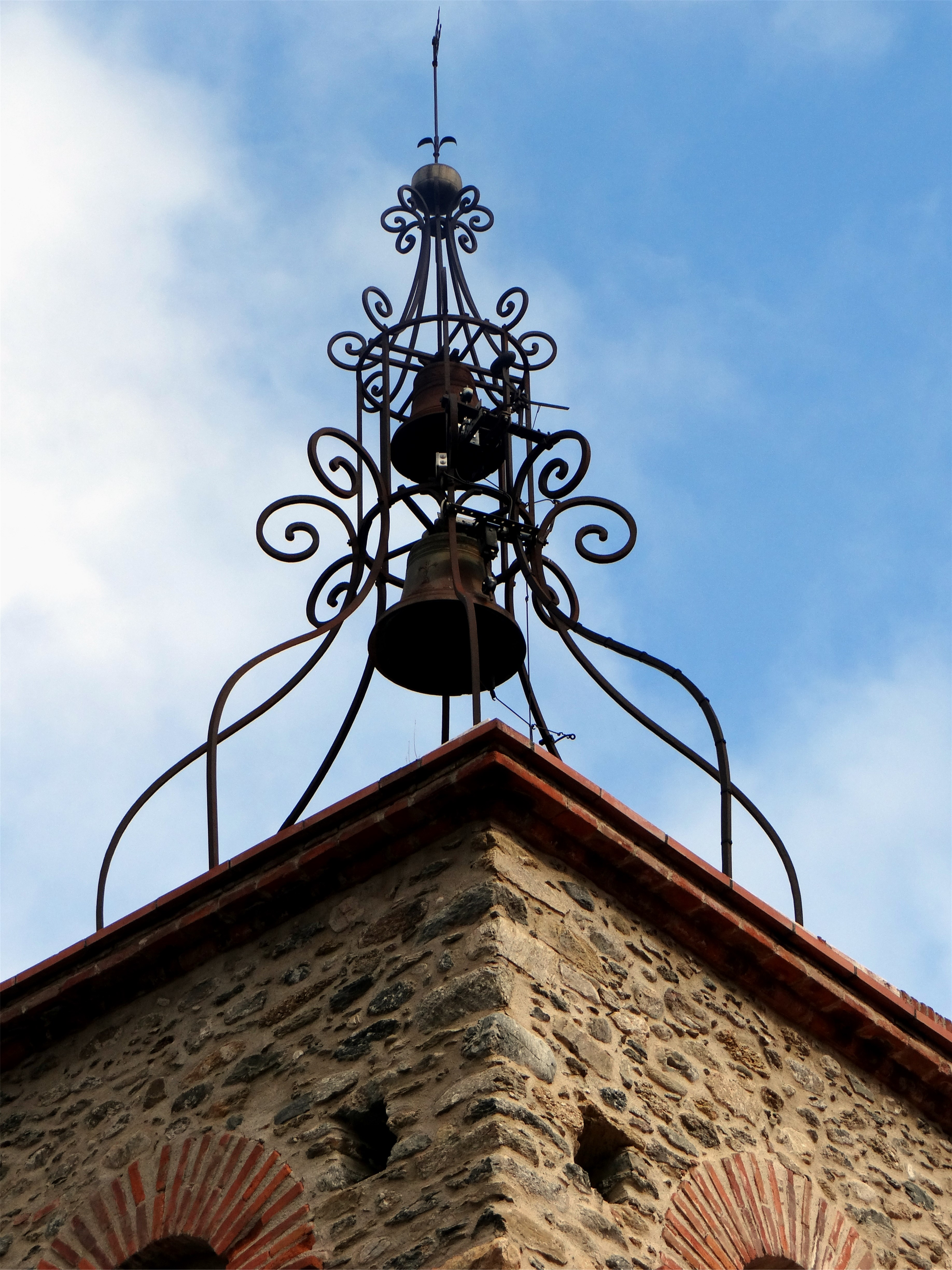 Clocher de l'église Saint-Félix de Codalet, Pyrénées-Orientales, France